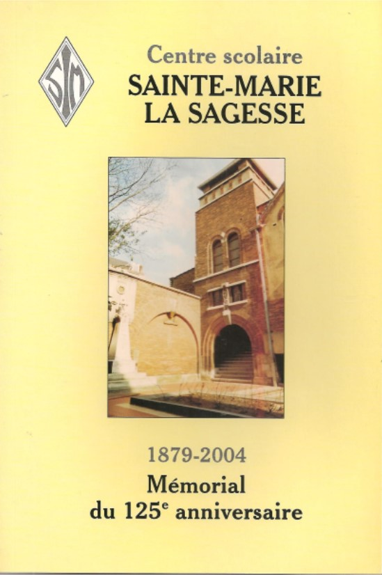 Couverture du mémorial des 125 ans de l'Institut Sainte-Marie de Schaerbeek, publication du Cercle Royal des Anciens Elèves de l'Instutut Sainte-Marie.